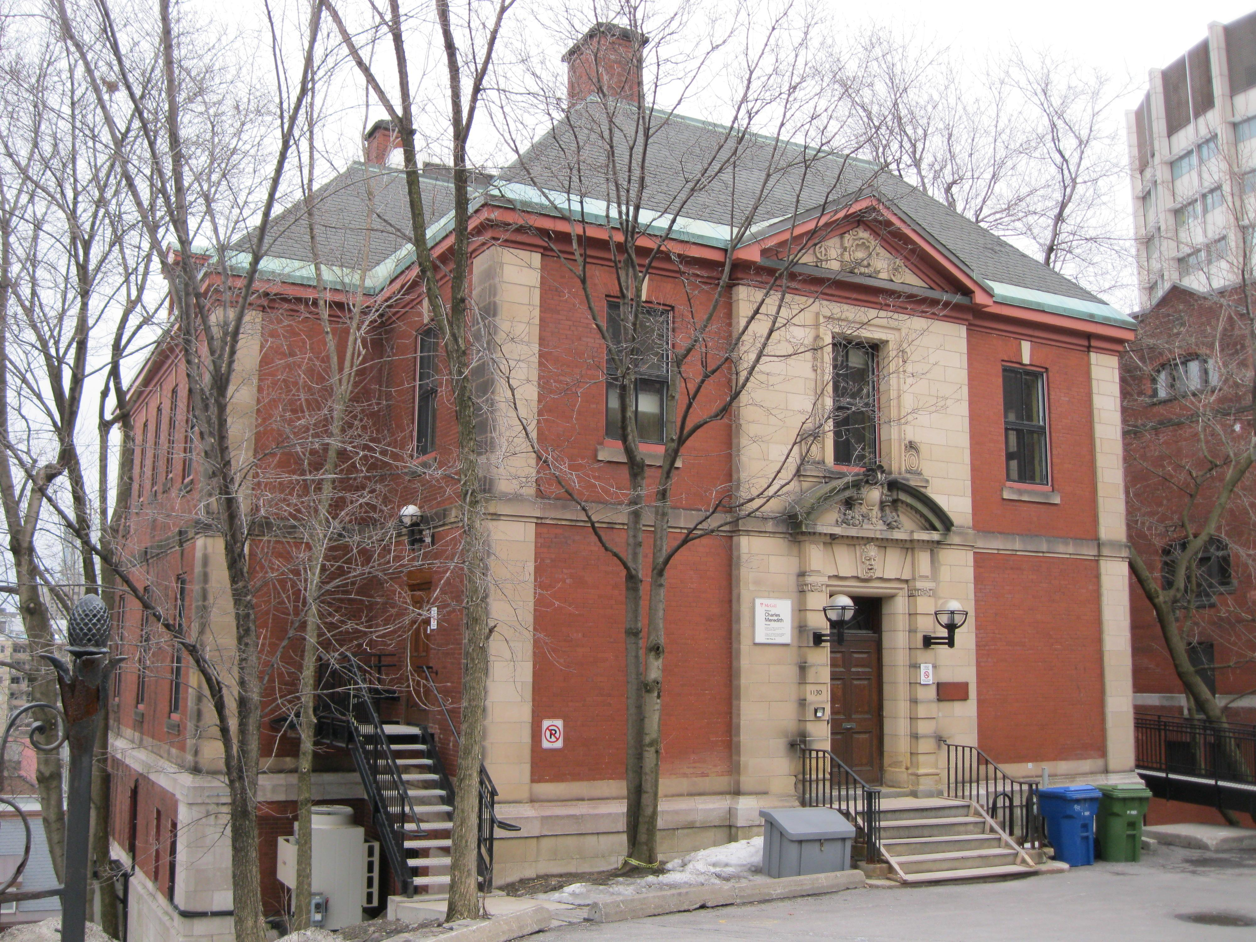 McGill University downtown campus